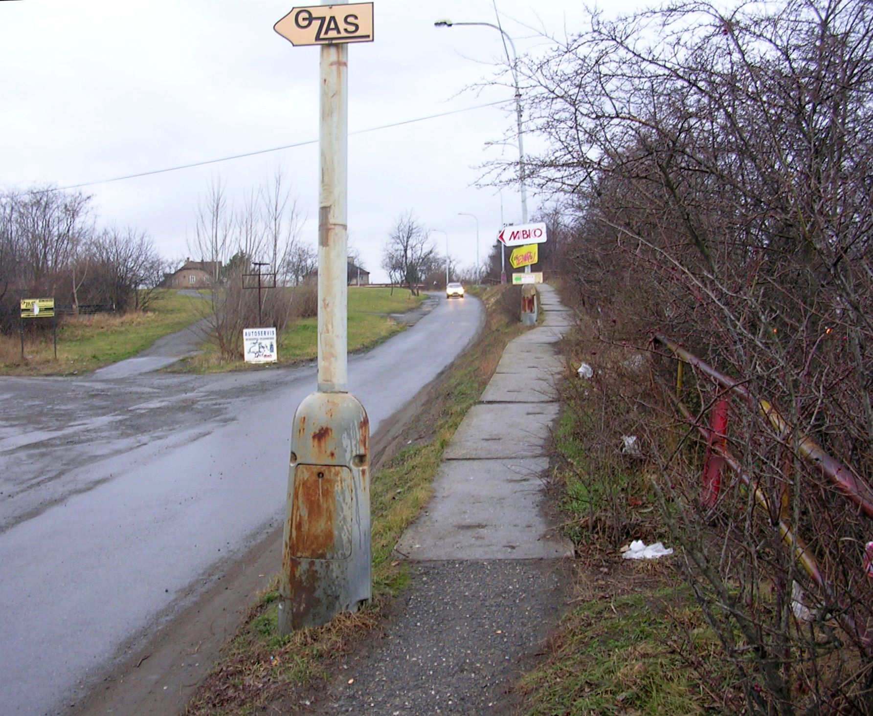 Praha, Strašnice, ulice U Trati, za železniční zastávkou Praha-Strašnice zastávka